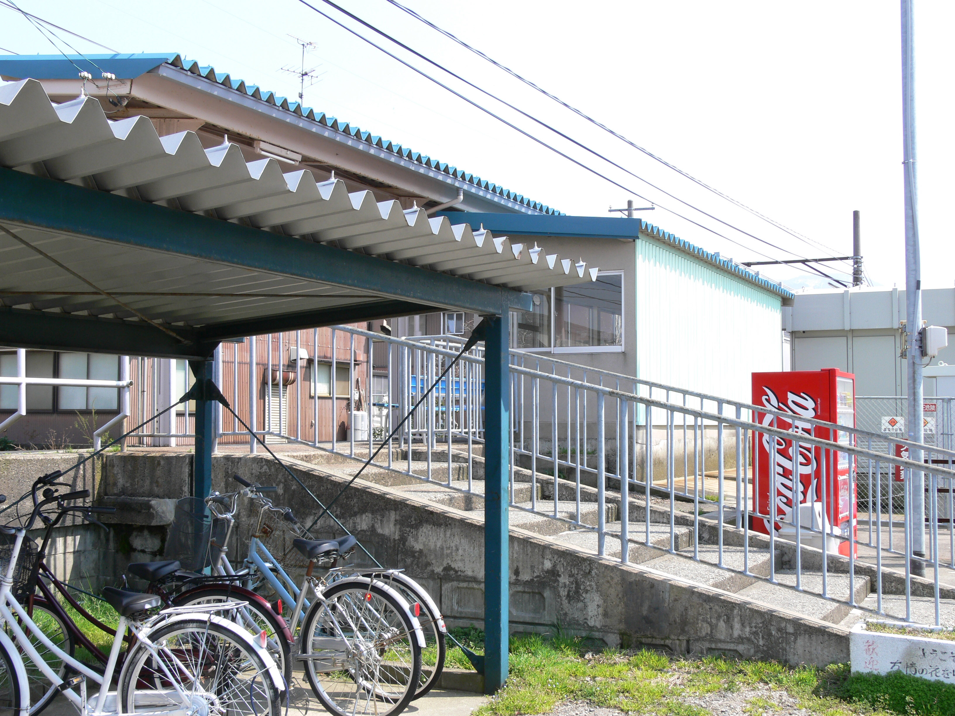 日御子駅